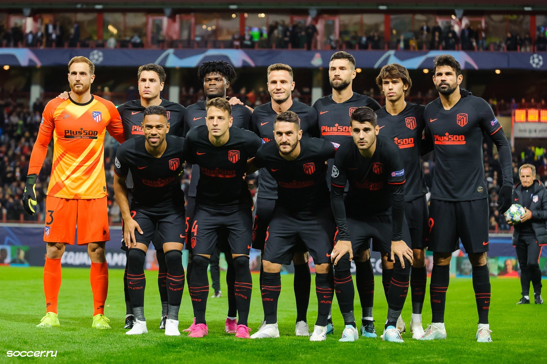 La squadra dell'Atlético Madrid scesa in campo contro la Lokomotiv Mosca